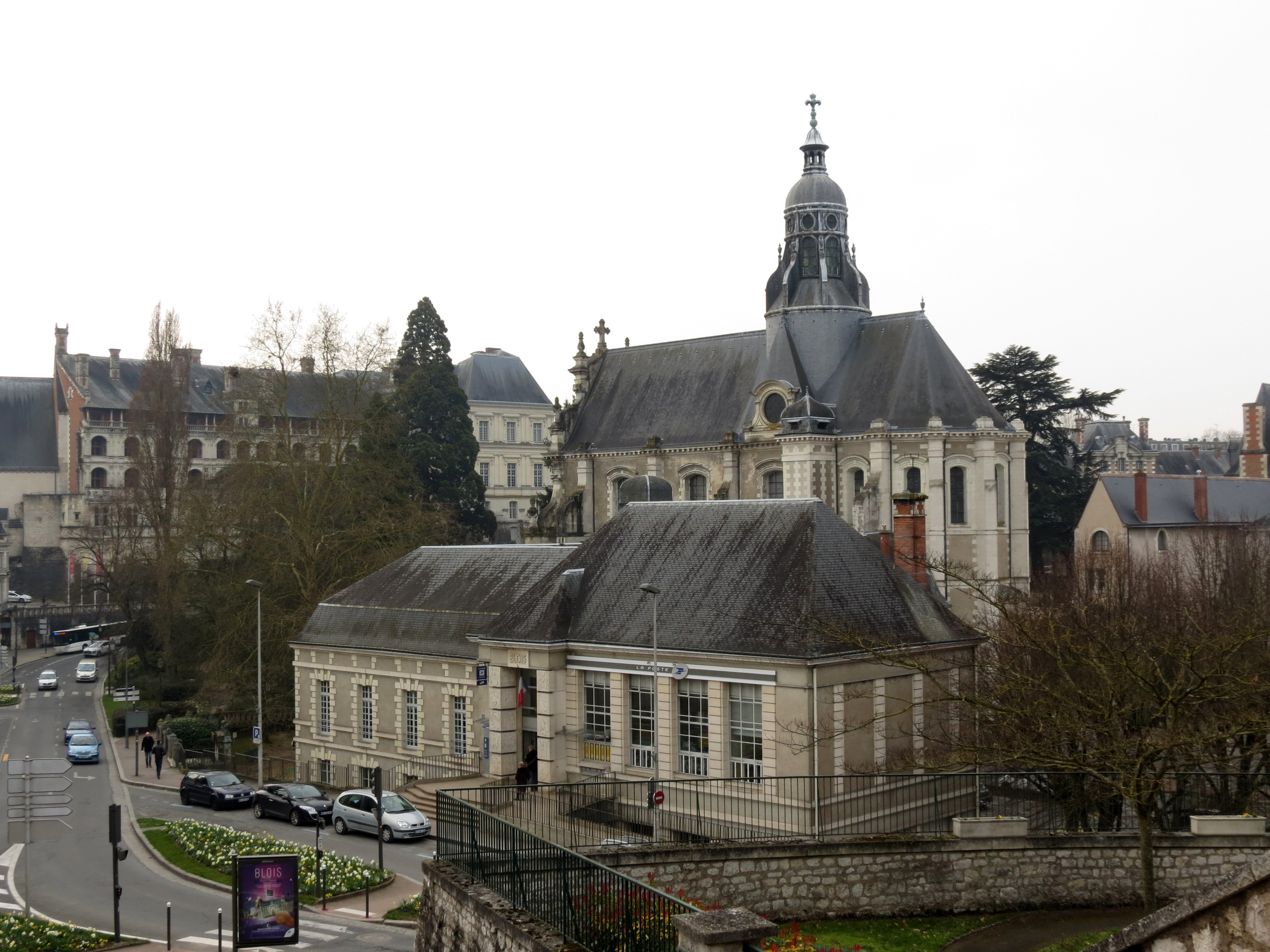 Les châteaux de la Loire.